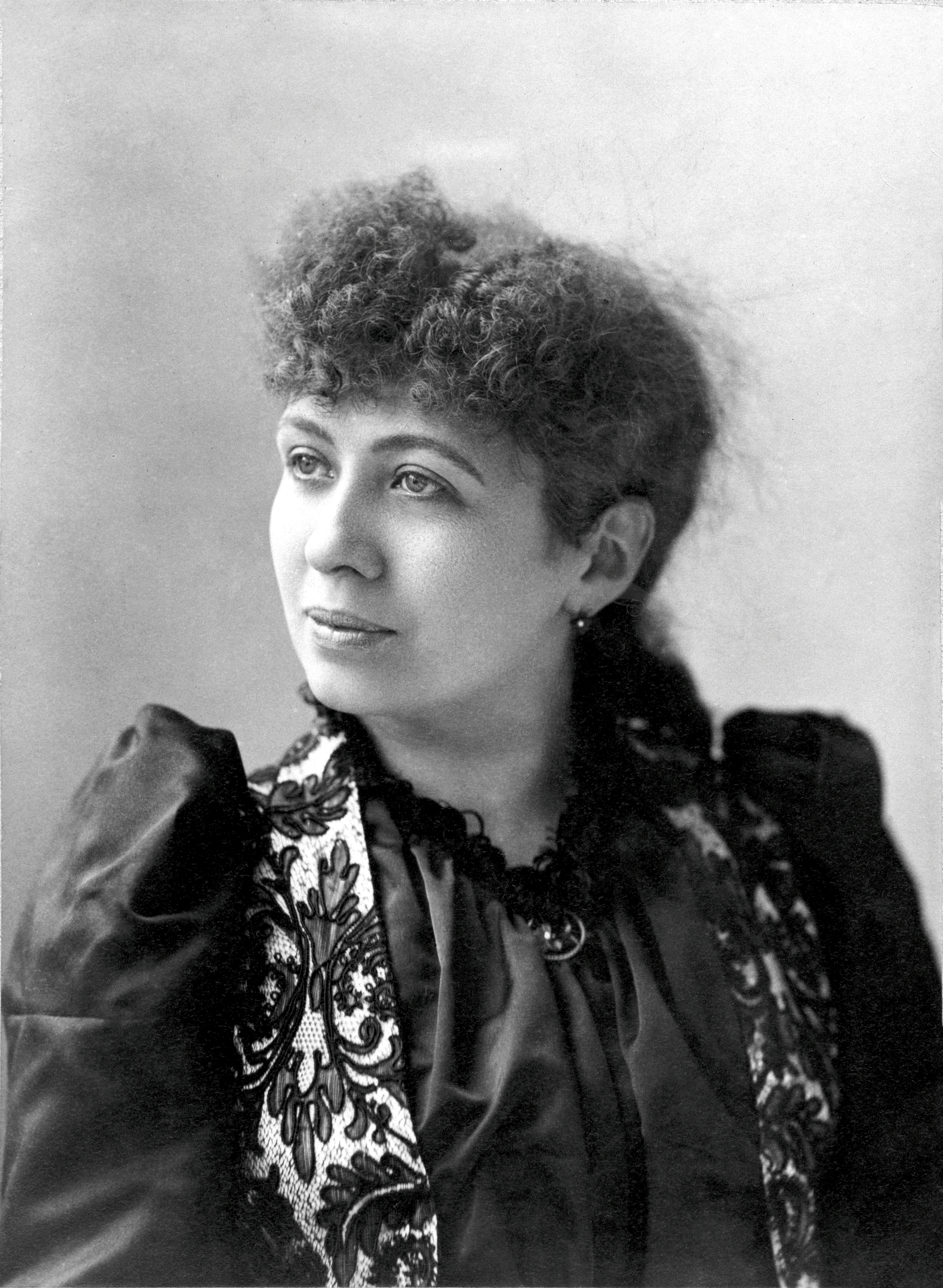 Séverine (1855–1929)), French anarchist, journalist, and feminist.